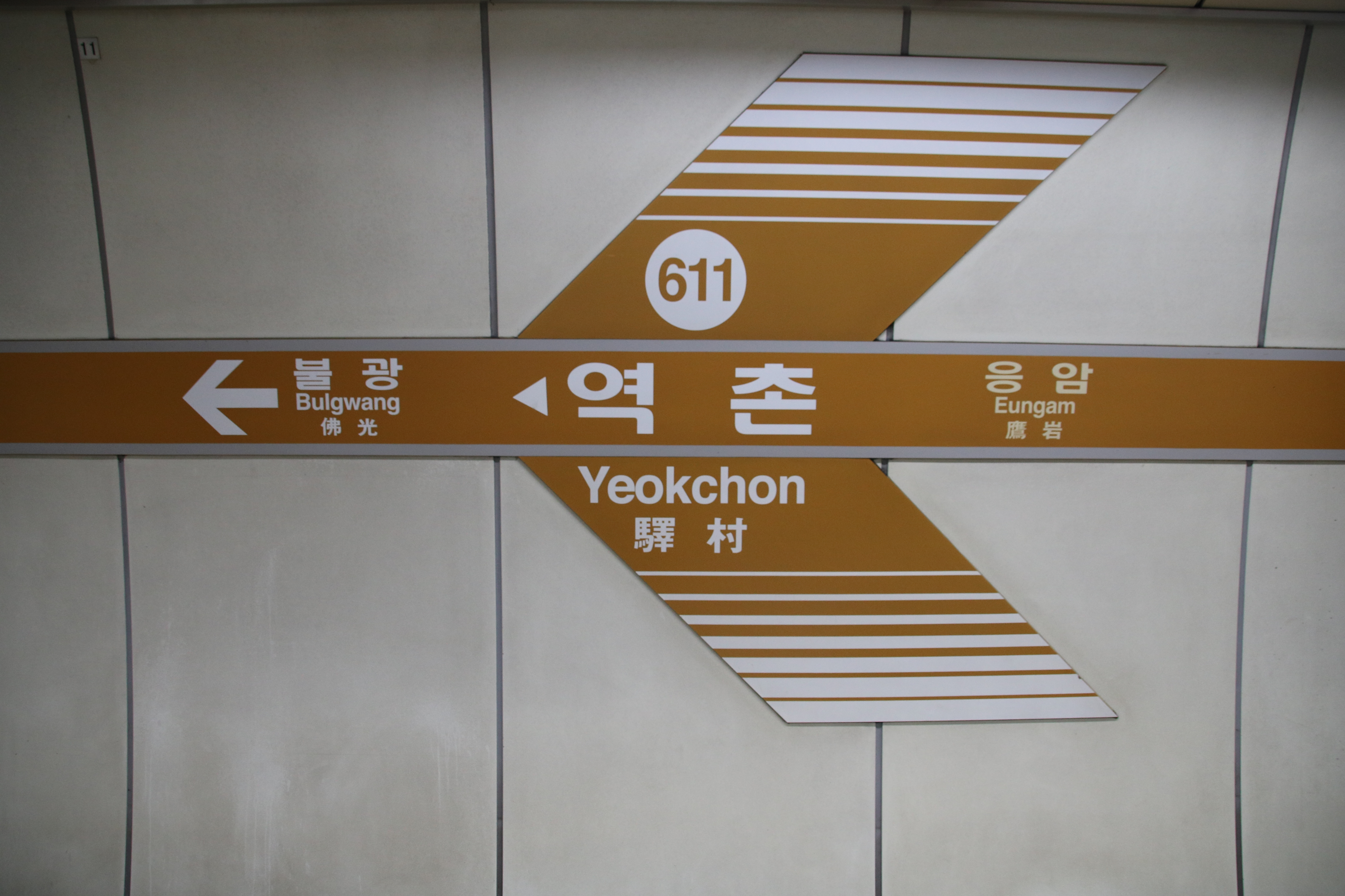 역촌역 역명판